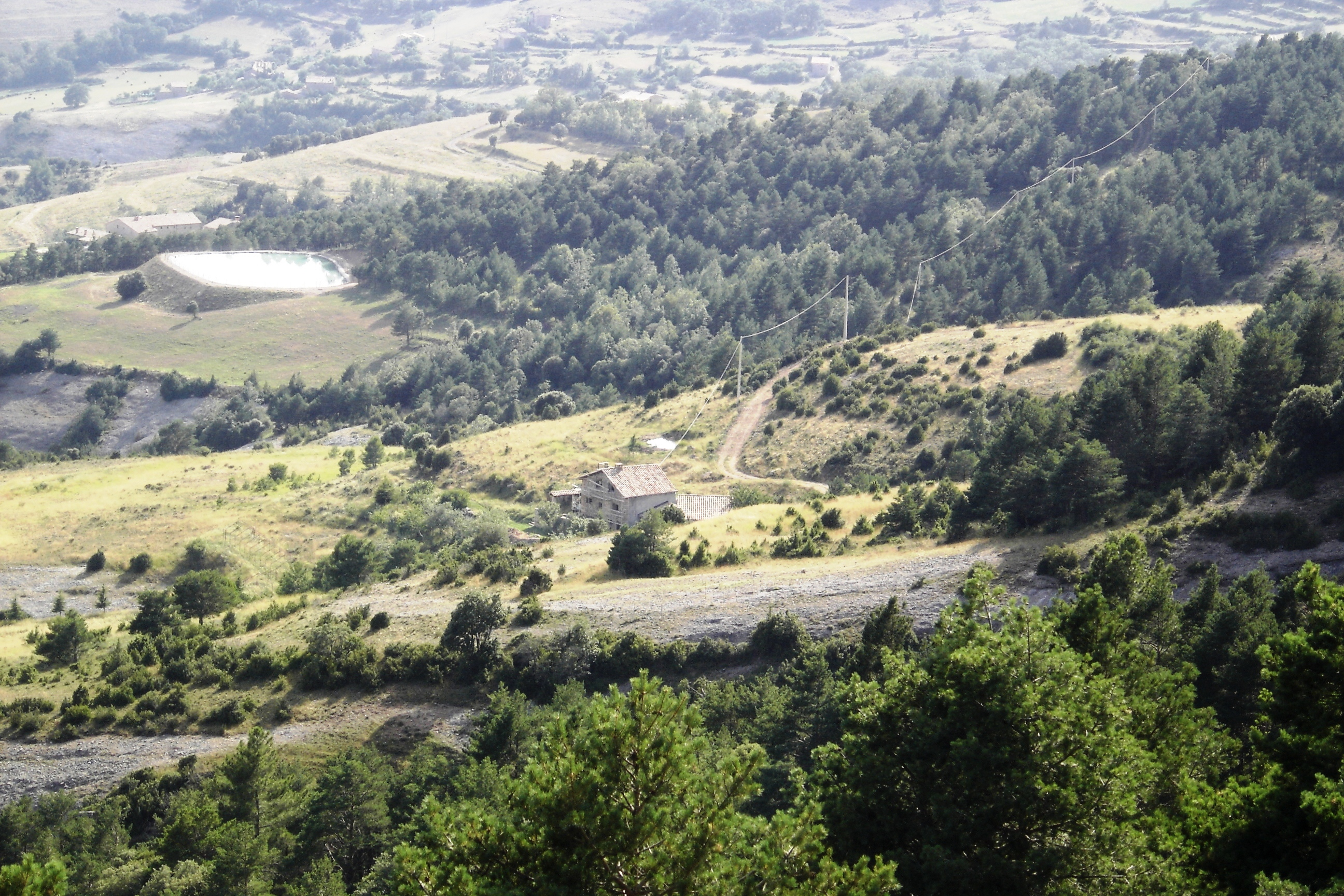 Masia de les Planes, al municipi de Guixers, al SW de Coll de Jou.